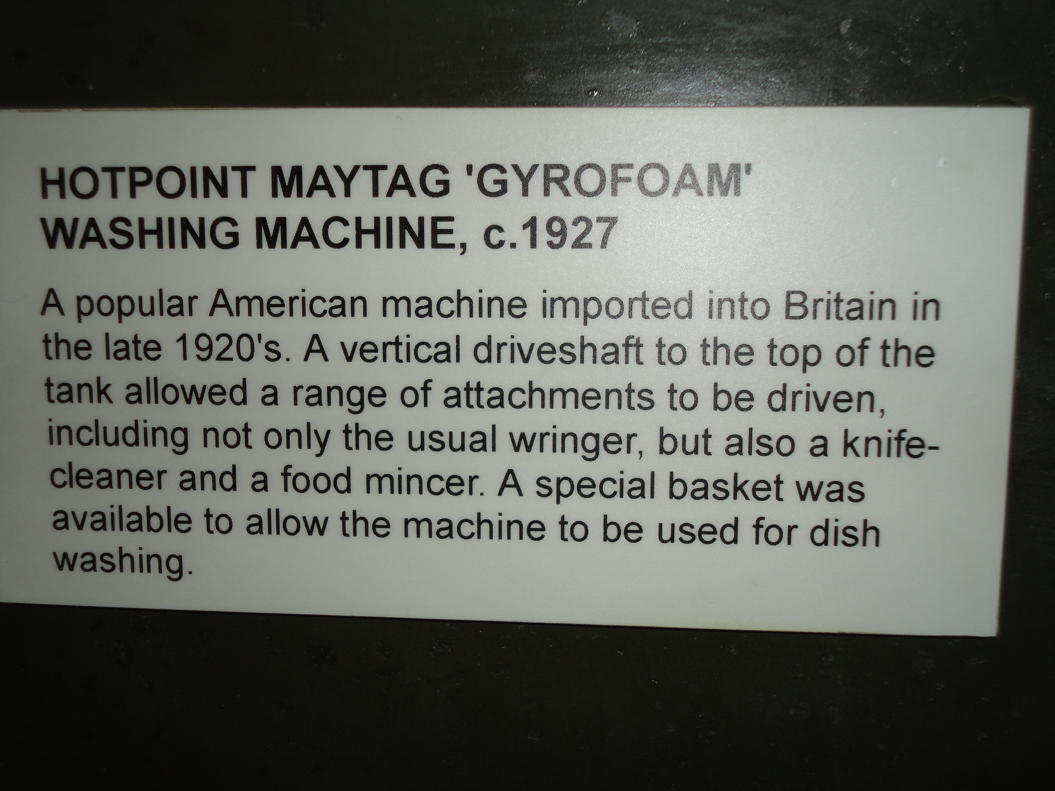 Фото таблички в музее на стиральной машине Maytag.